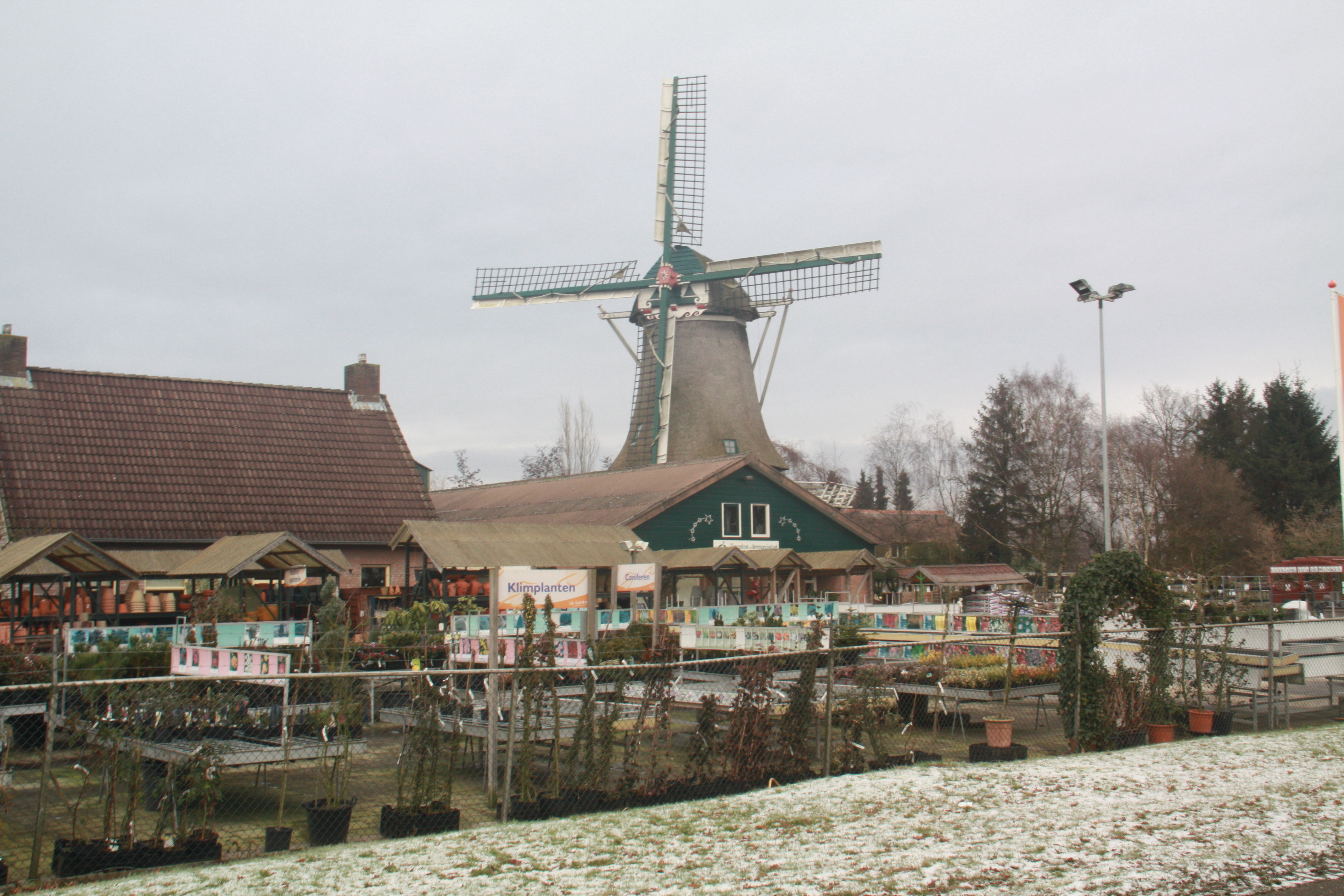 Zeldenrust (Zuidbarge)